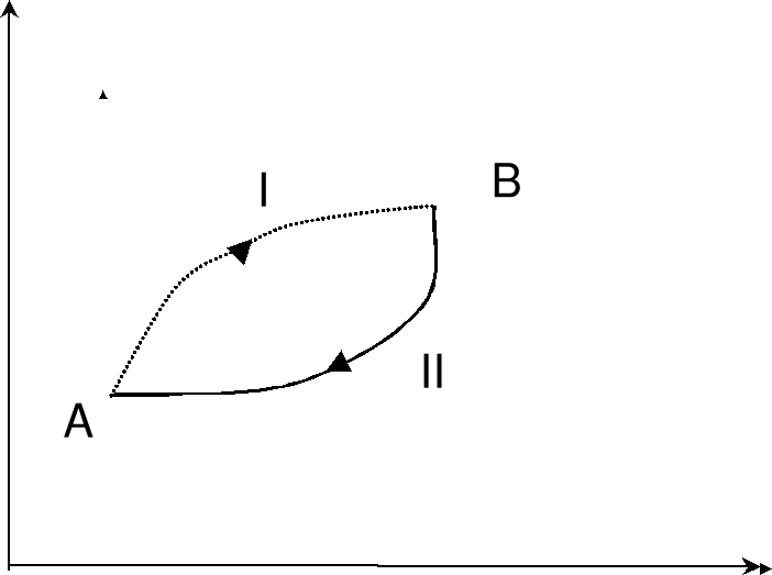 ciclo irreversibile